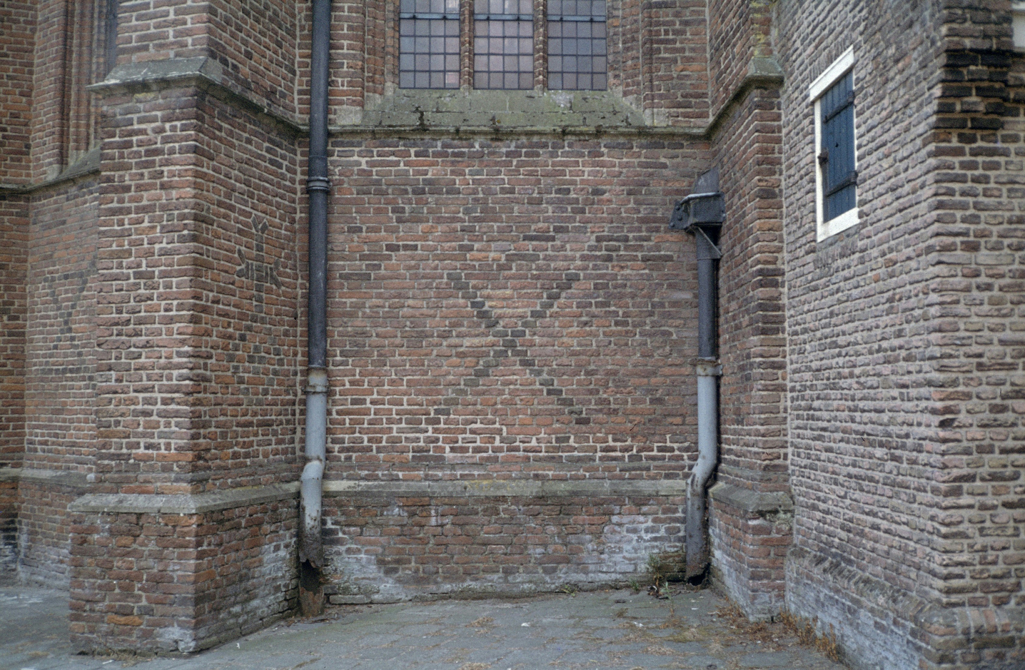 Kloosterkerk: metselteken in de kleine nissen west- en noordgevel